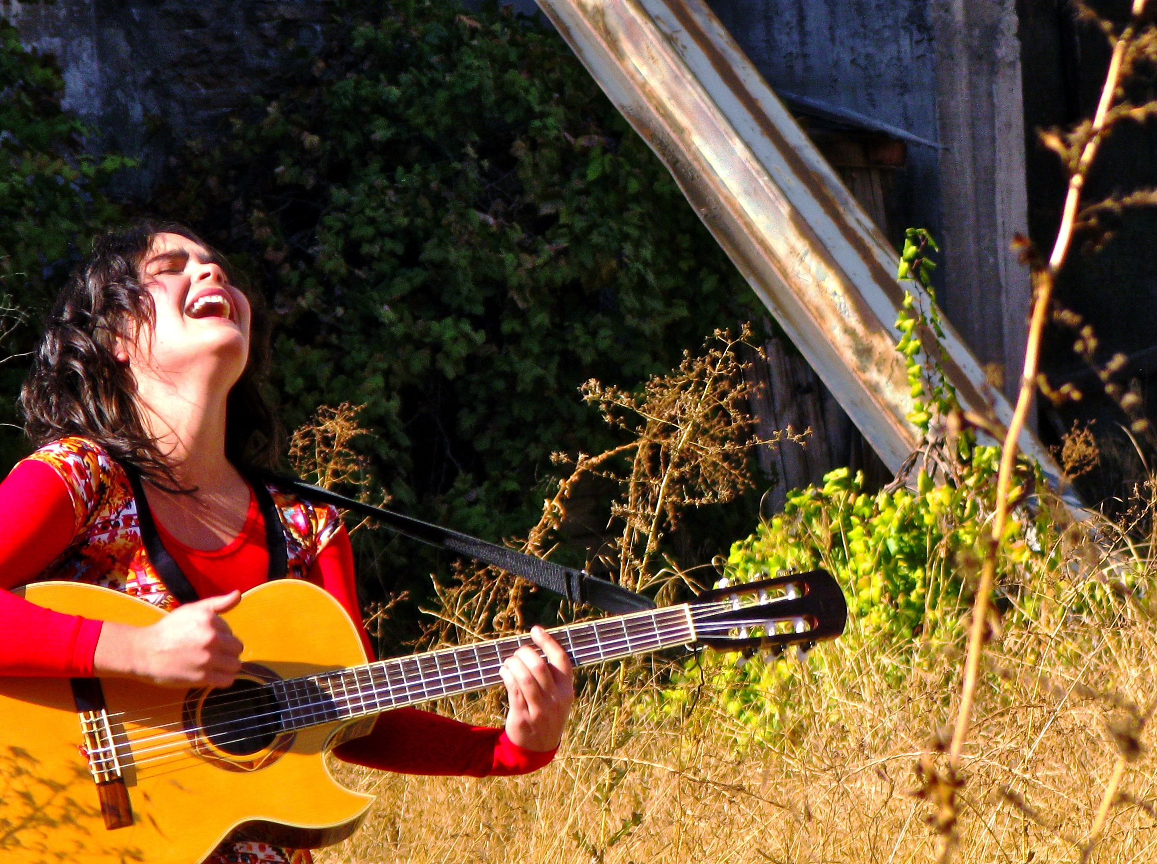 canta con el alma. El video acá